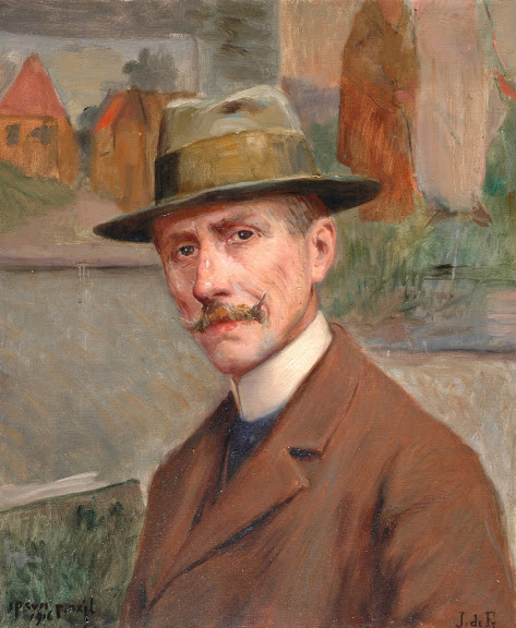 Un peintre picard